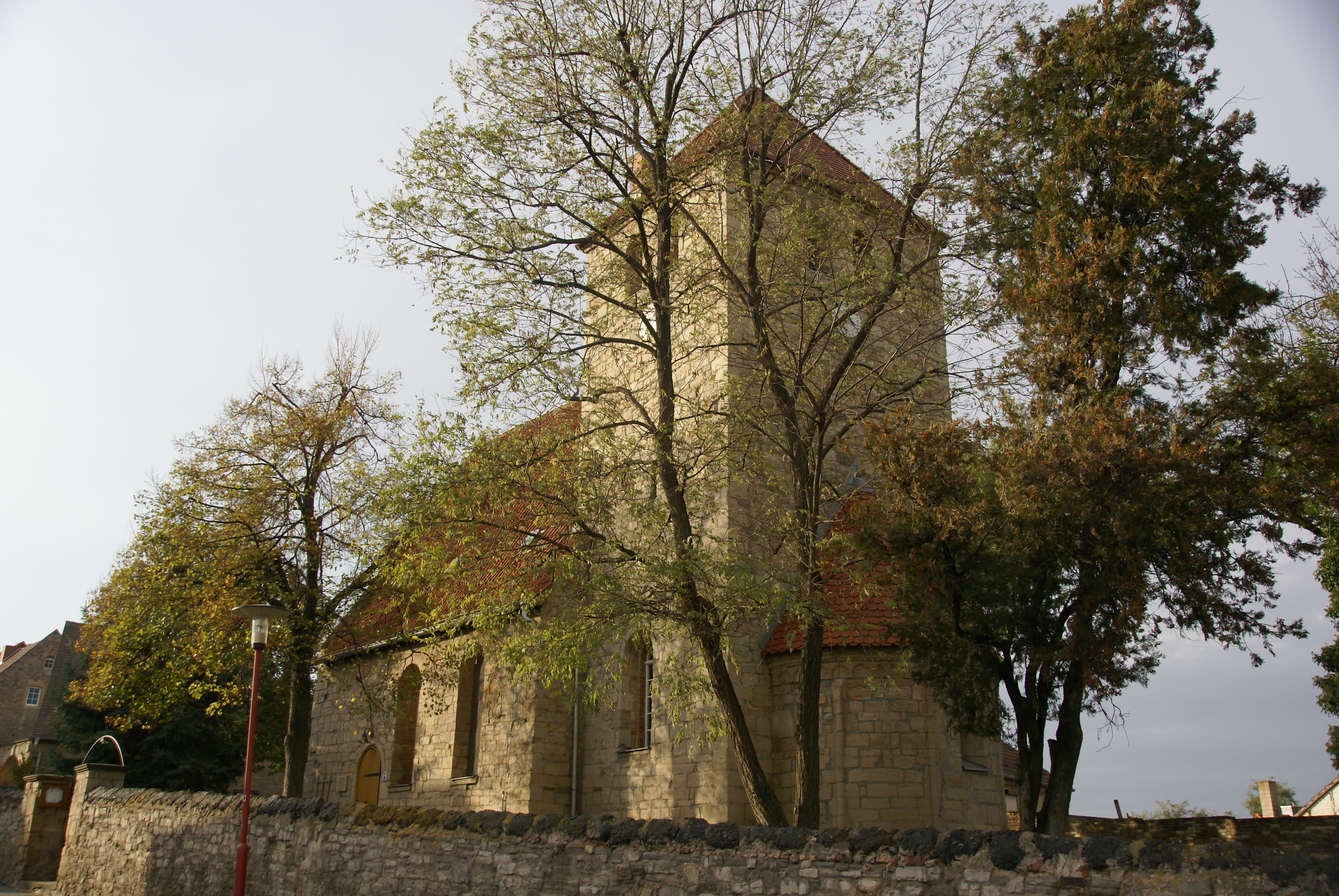 Die Dorfkirche von Amsdorf, Landkreis Mansfeld-Südharz